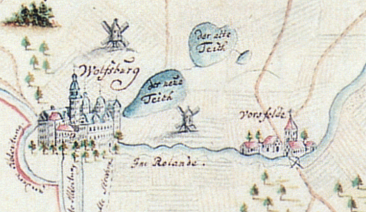 Vorsfelde, die Wolfsburg, der neue Teich und der alte Teich auf dem Vorsfelder Werder